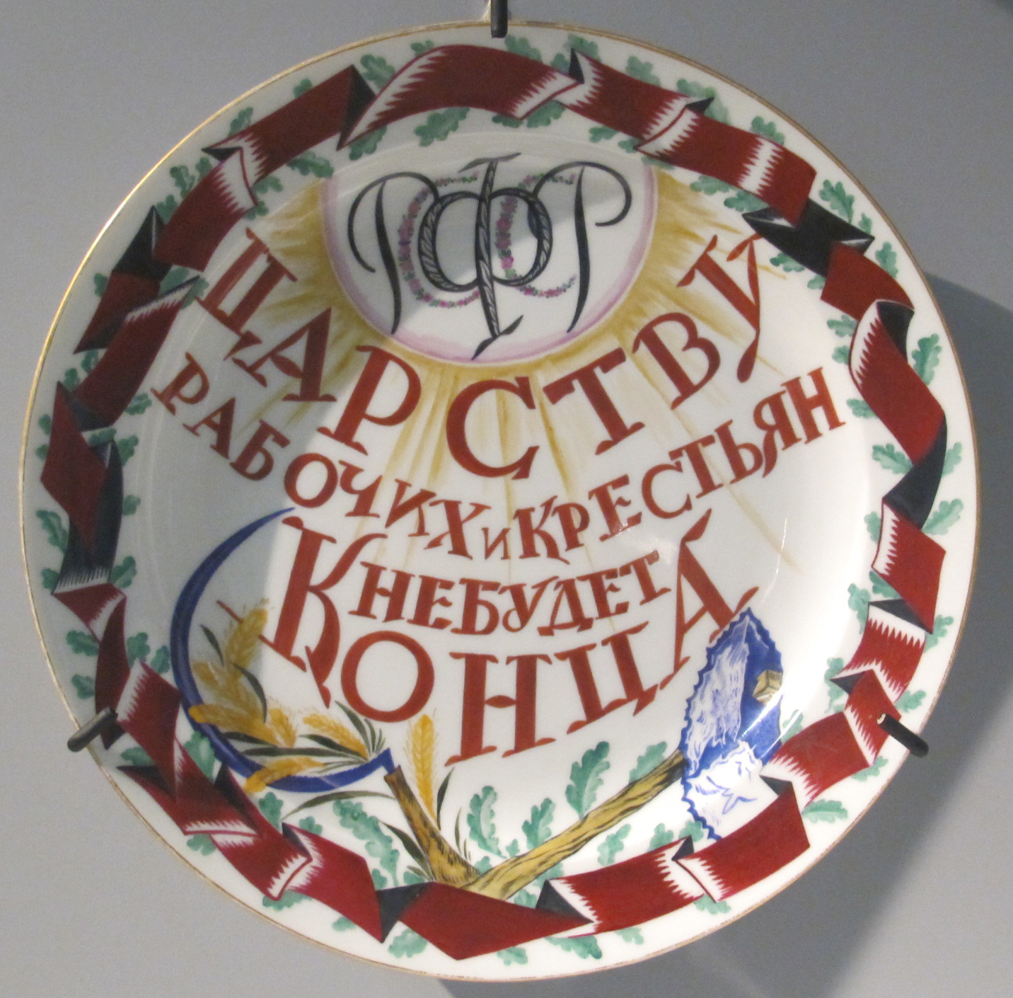 S.v. chekhonin, piatto rivoluzionario con slogan 'Il govenro dei lavoratori e dei contadini non finirà mai', 1920